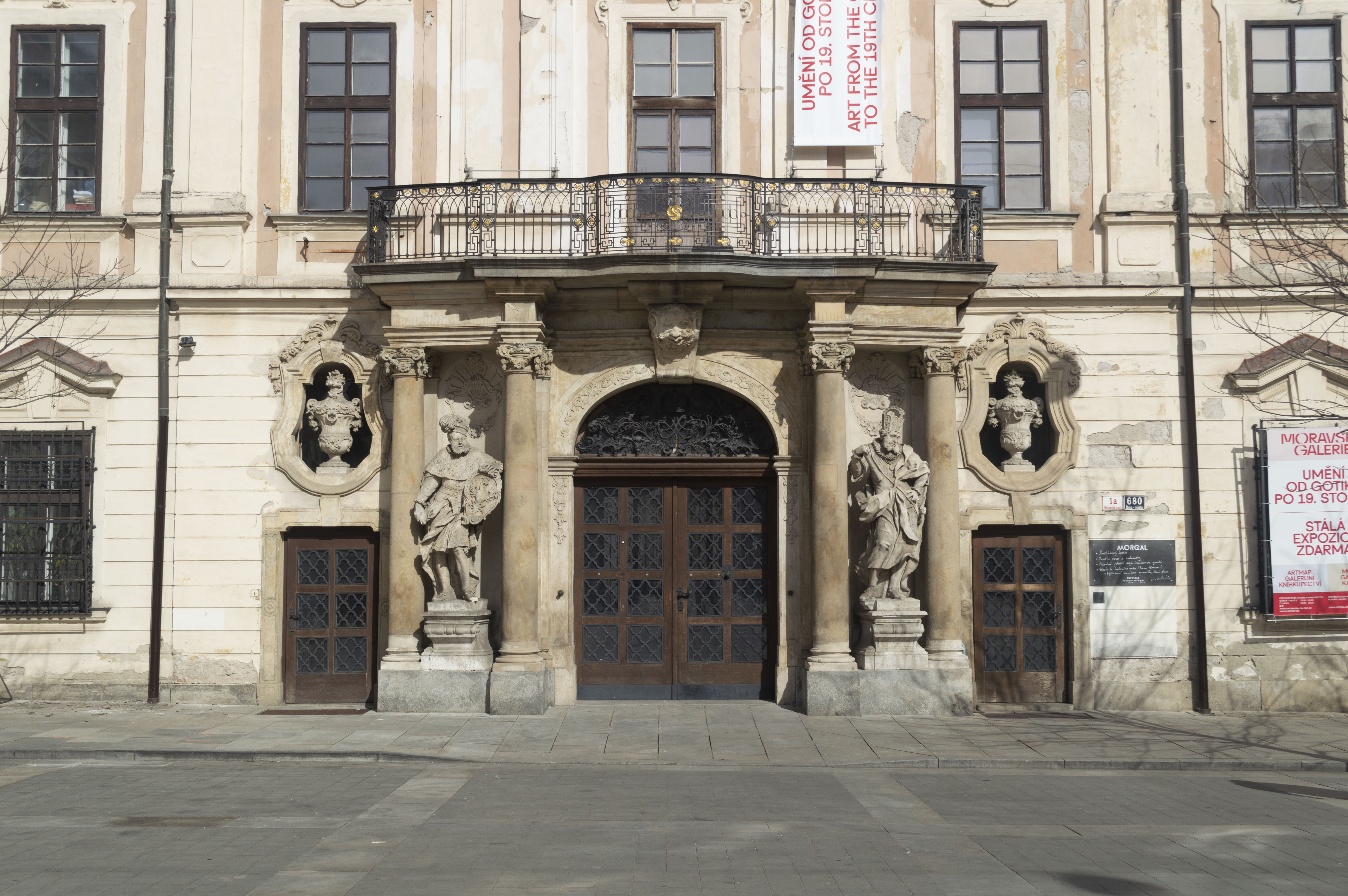 Budovy bývalého augustiniánského kláštera, prefektura. Dnes Místodržitelský palác. Portál se sochami Josefa Leonarda Webera.